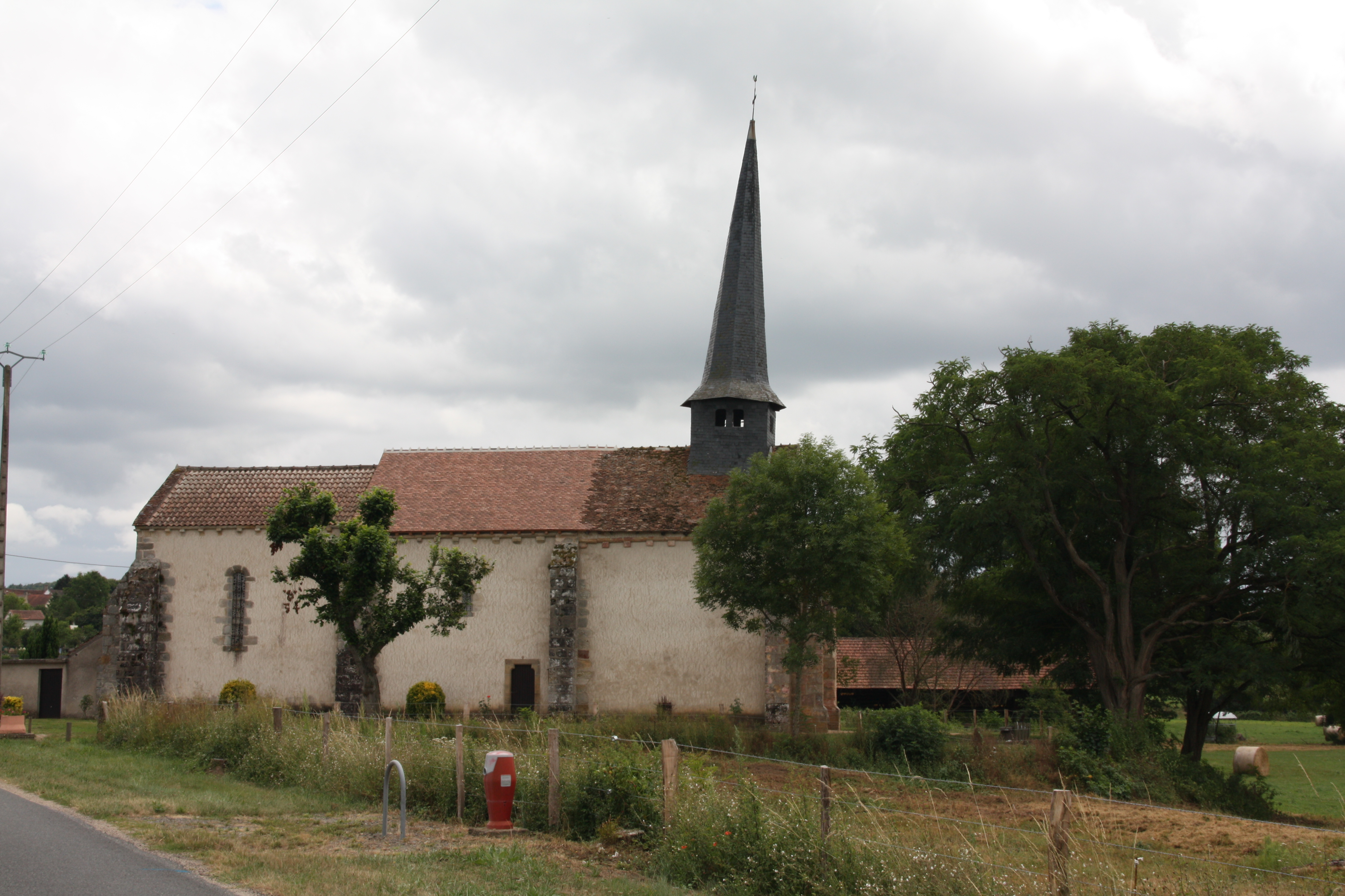 Église Saint-Martin à Reugny, France